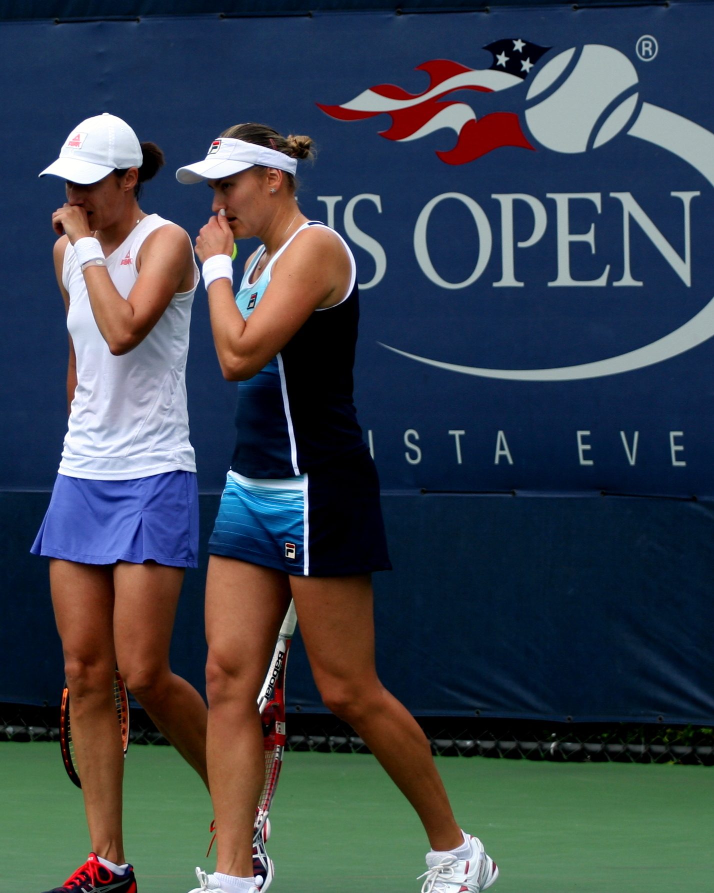 U.S. Open Saturday, Aug. 31, 2013